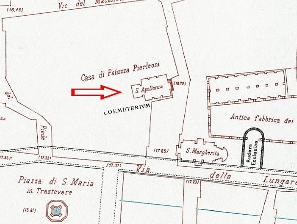 Pianta di Lanciani